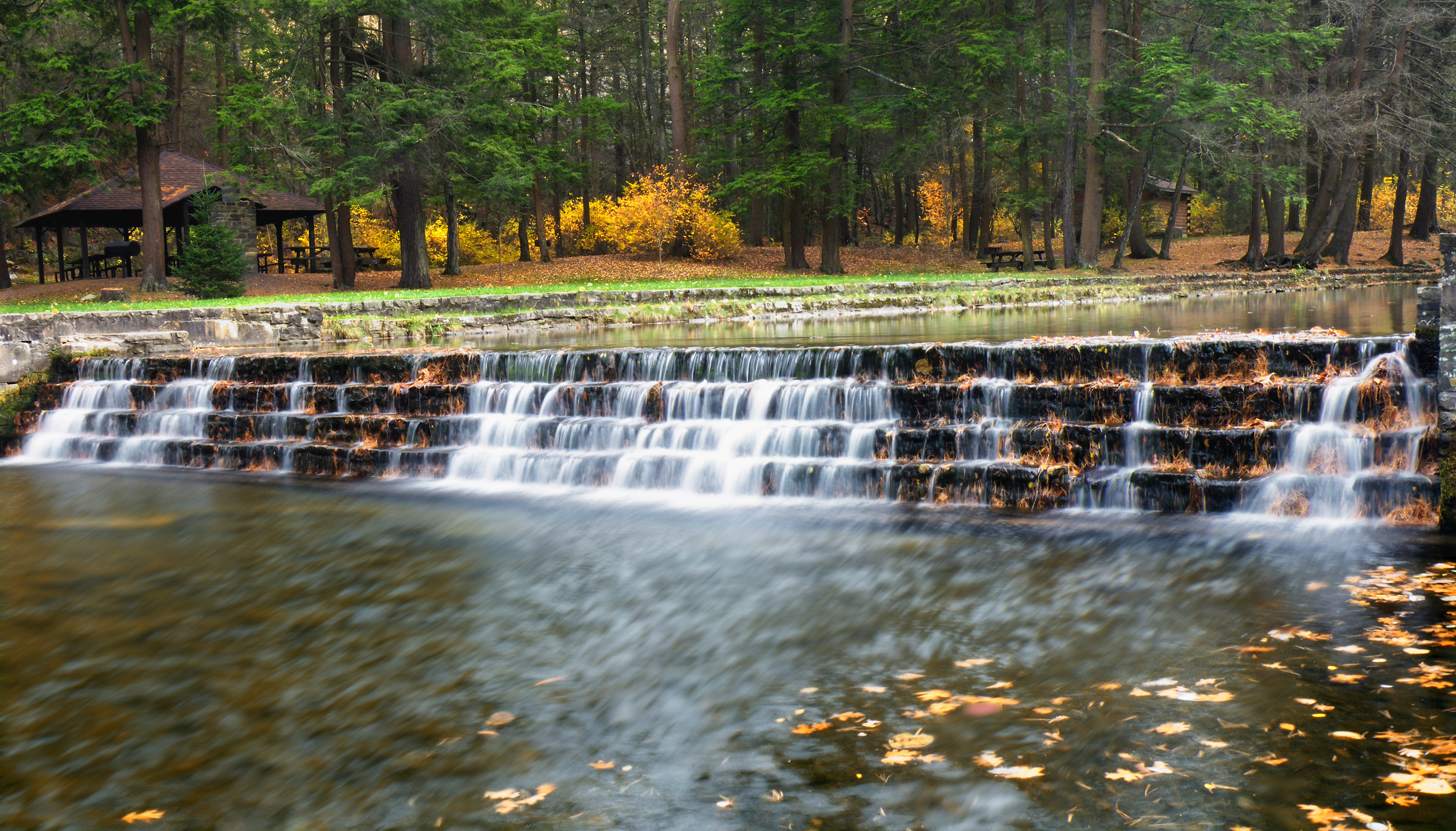 Rauchtown Run dam, Ravensburg State Park, Clinton County.